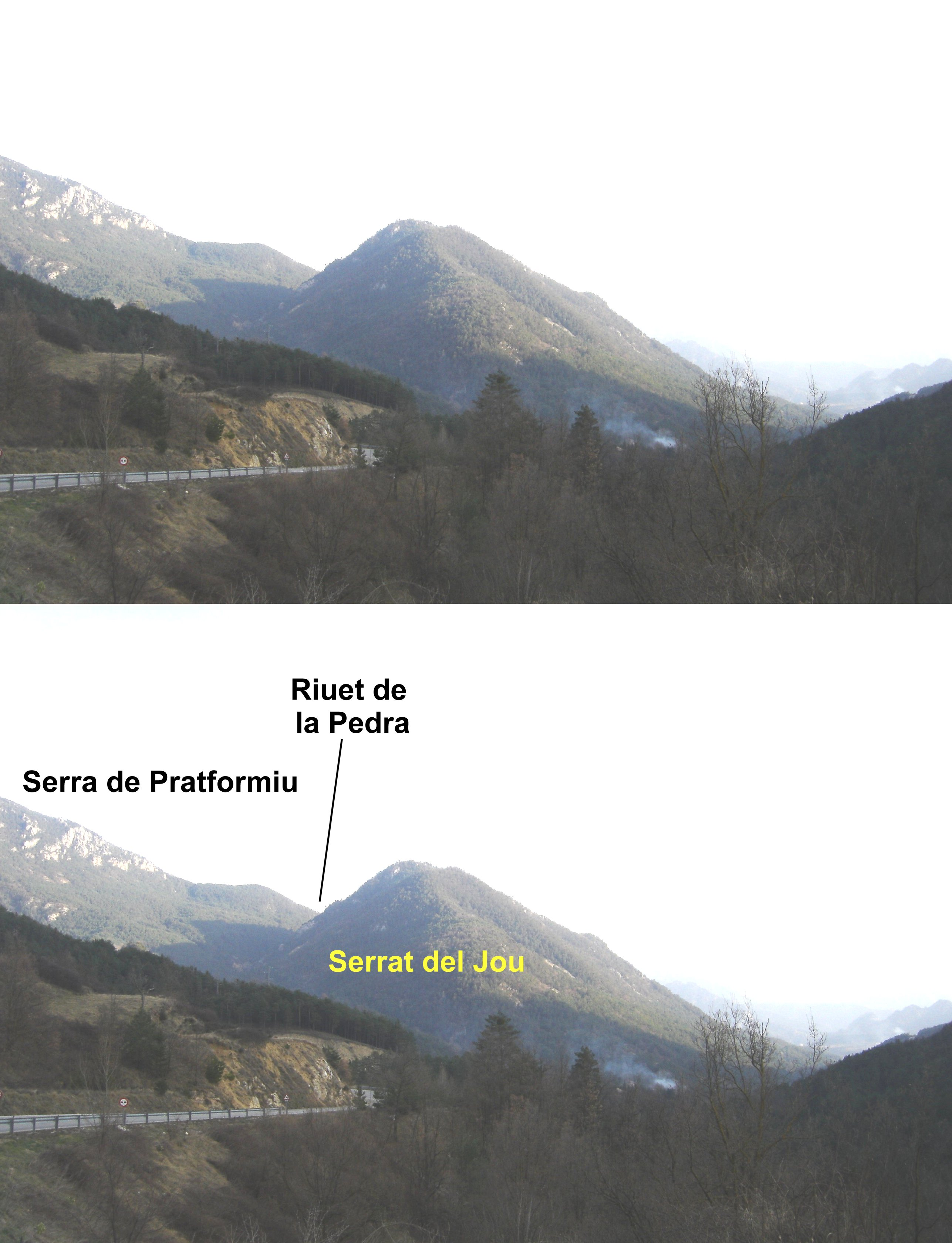 El vessant nord del Serrat del Jou vist des de la sortida de La Coma (La Coma i la Pedra, Vall de Lord, Solsonès) A la foto també aí pot veure el vessant meridionaal de la Serra de Pratformiu i la call alta del Riuet de la Pedra que s'escola entre aquestes dues formacions muntanyoses.